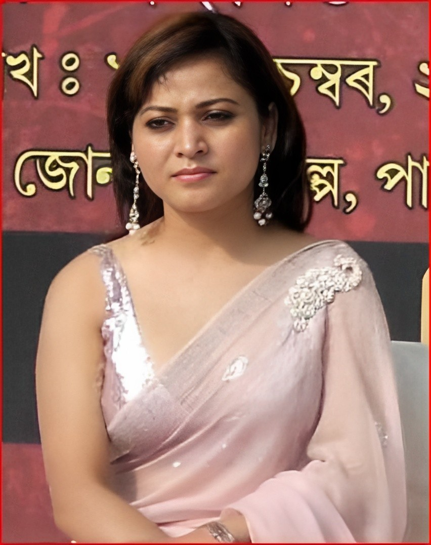 অসমীয়া: জেৰিফা ৱাহিদ, অসমীয়া চলচ্চিত্ৰ অভিনেত্ৰী